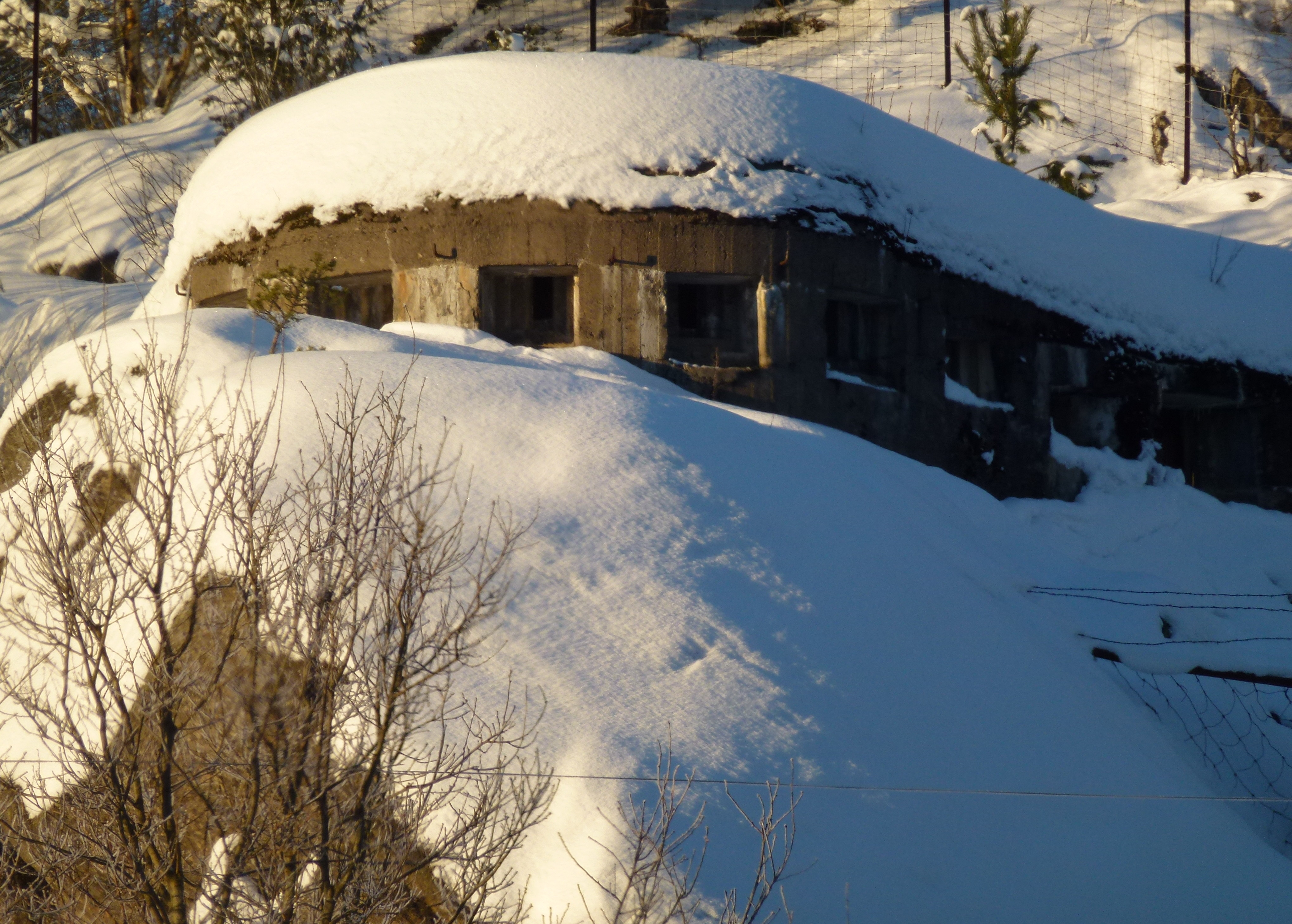 Sundbyfortet